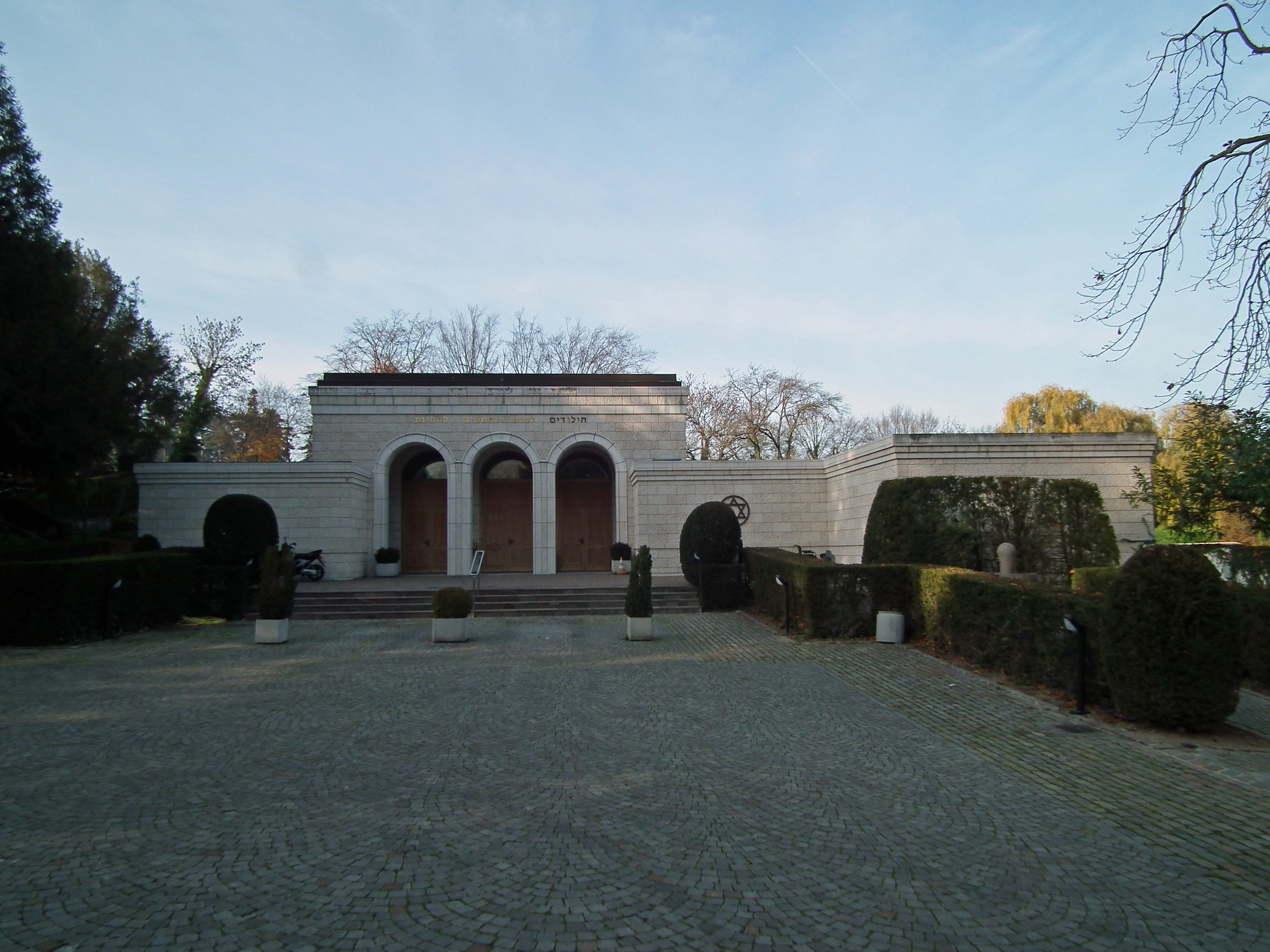 Oratoire israélite de Veyrier, construit par Julien Flegenheimer en 1931. Recouvert de pierre de Jérusalem en 2001.